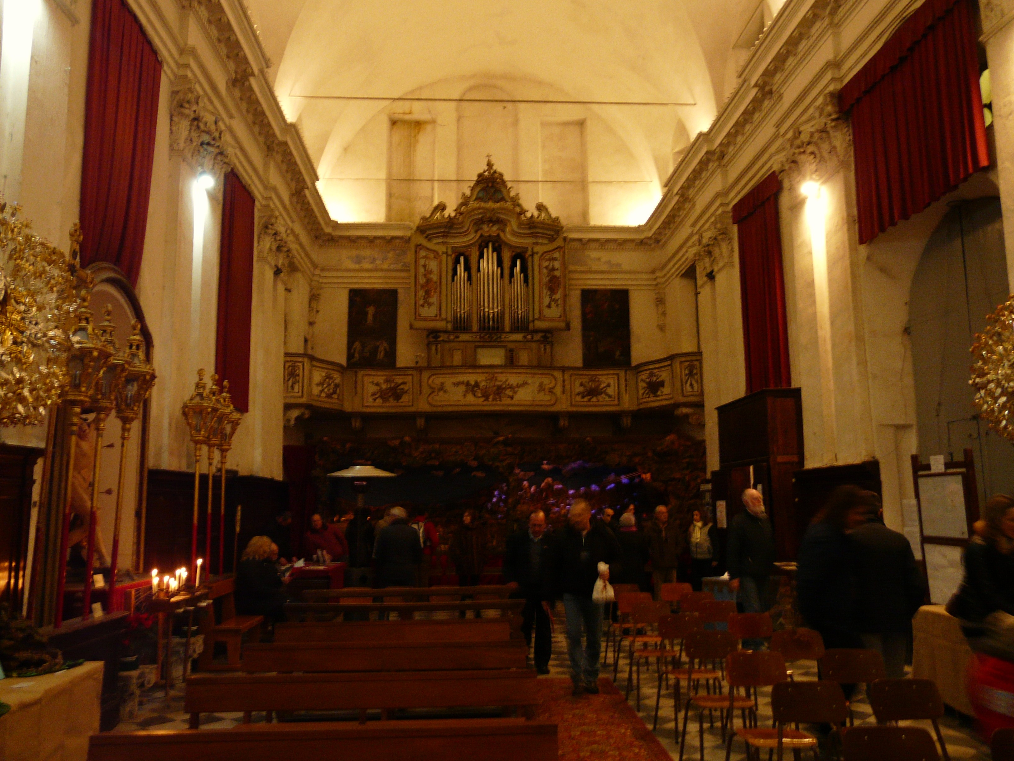 Navata dell'oratorio dei Bianchi, Rapallo, Liguria, Italia